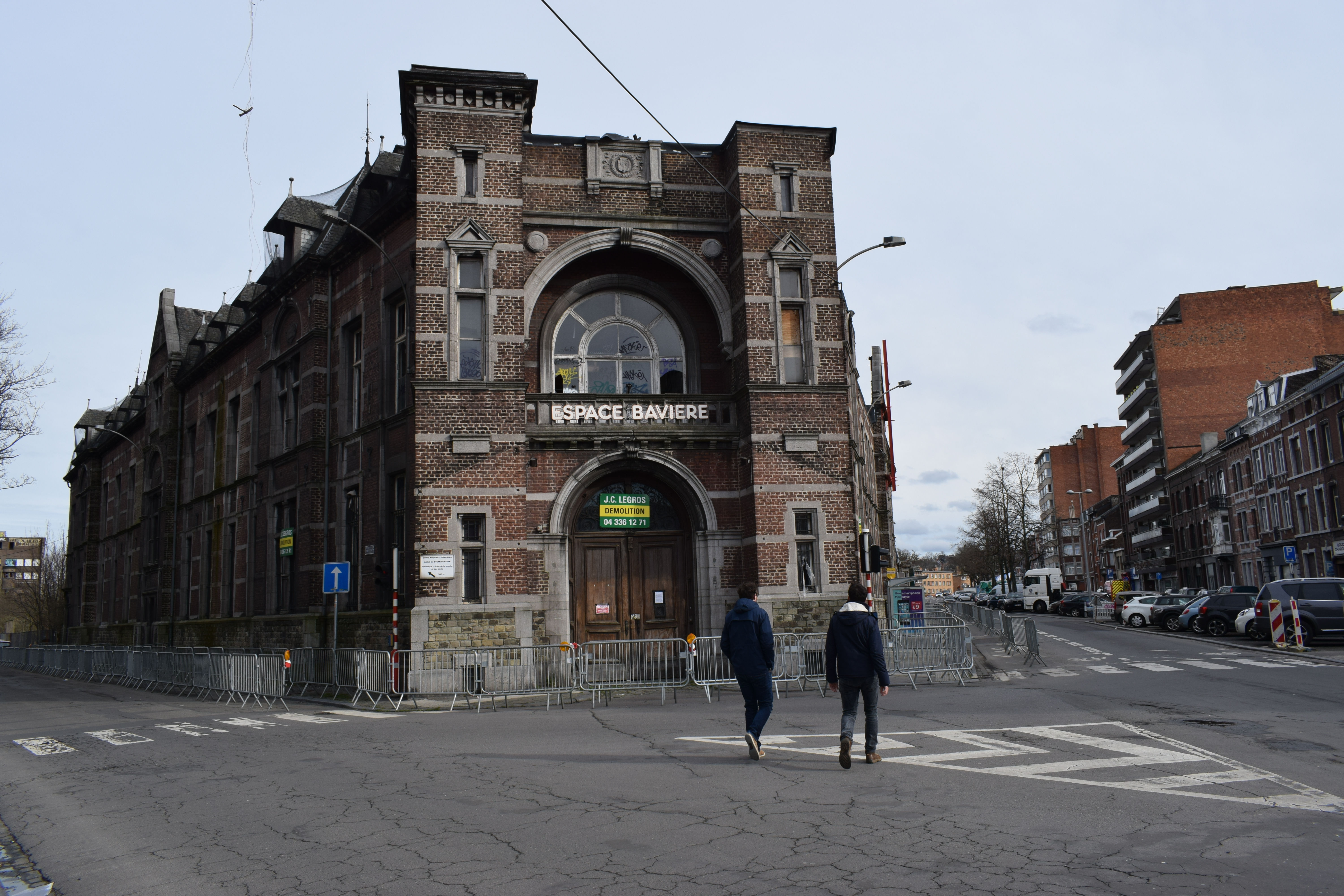 Vue du boulevard de la Constitution, dans le quartier d'Outremeuse à Liège (Belgique).